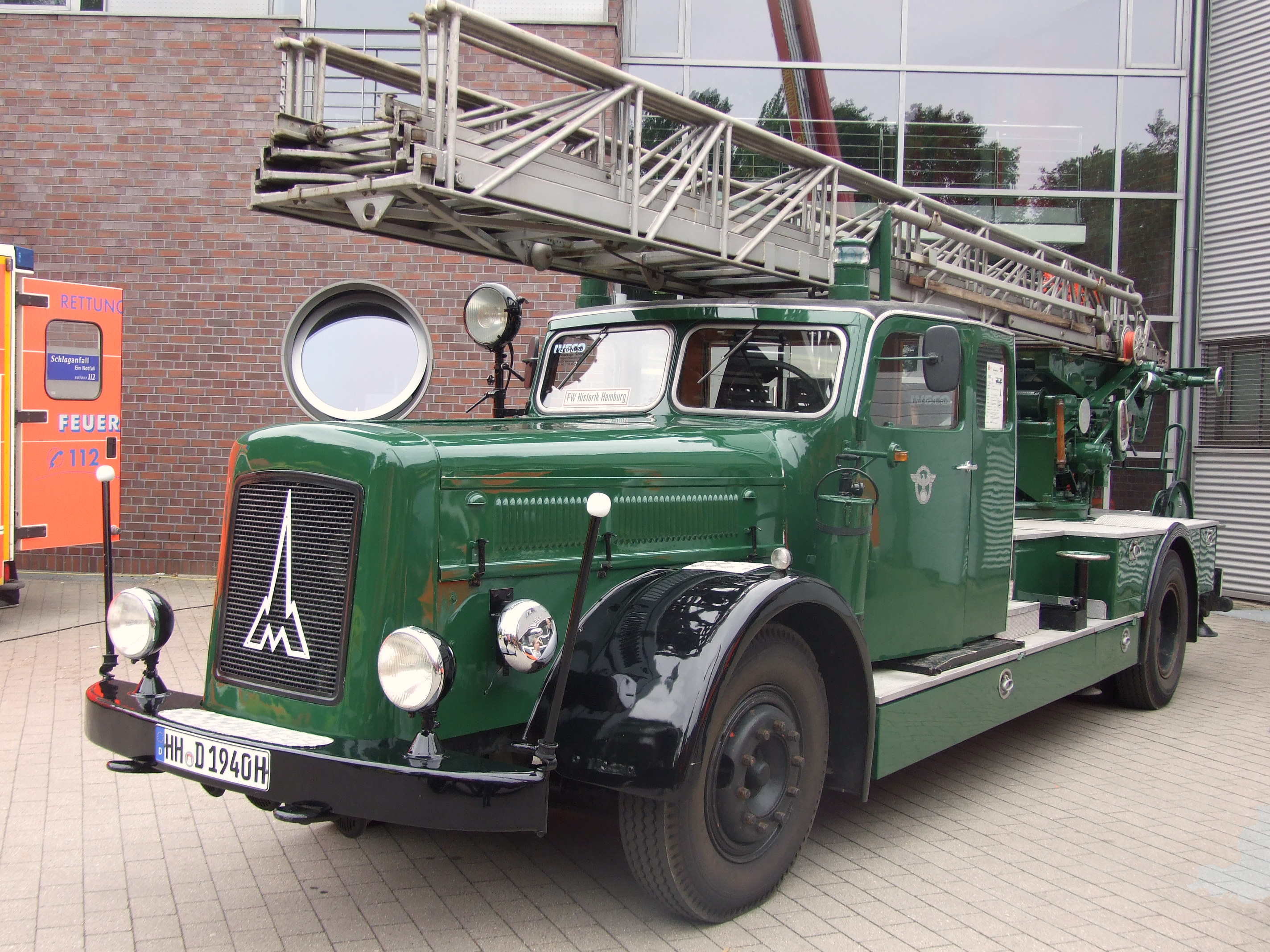 Magirus Kraftfahrleiter 26 Erstzulassung:03.07.1942 Listenpreis: 37.063 RM Besatzung: 1 / 1 Sitzplätze 7 Hersteller: Klöckner - Humboldt - Deutz AG, Werk Ulm Typ: FL 145 Motor: F 6 L 514 Reihensechszylinder Diesel Leistung: 125 PS bei 2300 U/min, Hubraum: 9123cm³ Aufbau: Klöckner - Humbold - Deutz AG Leitersatz: 26m hydraulisch, Fallhaken + 2m Handauszug, 4-teilig Gesamtgewicht: 11250 kg Leergewicht: 9000 kg Im Dienst bis 12.05.1978, zuletzt bei der Landesfeuerwehrschule Schleswig Holstein, Flensburg Einsatz bei: Feuerschutzpolizei/Berufsfeuerwehr Neumünster, ab 1969 Verwendung als Ausbildungsfahrzeug Kennzeichen: POL-34717, FL 2032, HH D1940H